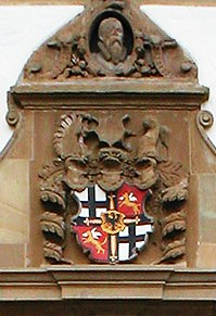 s.o.